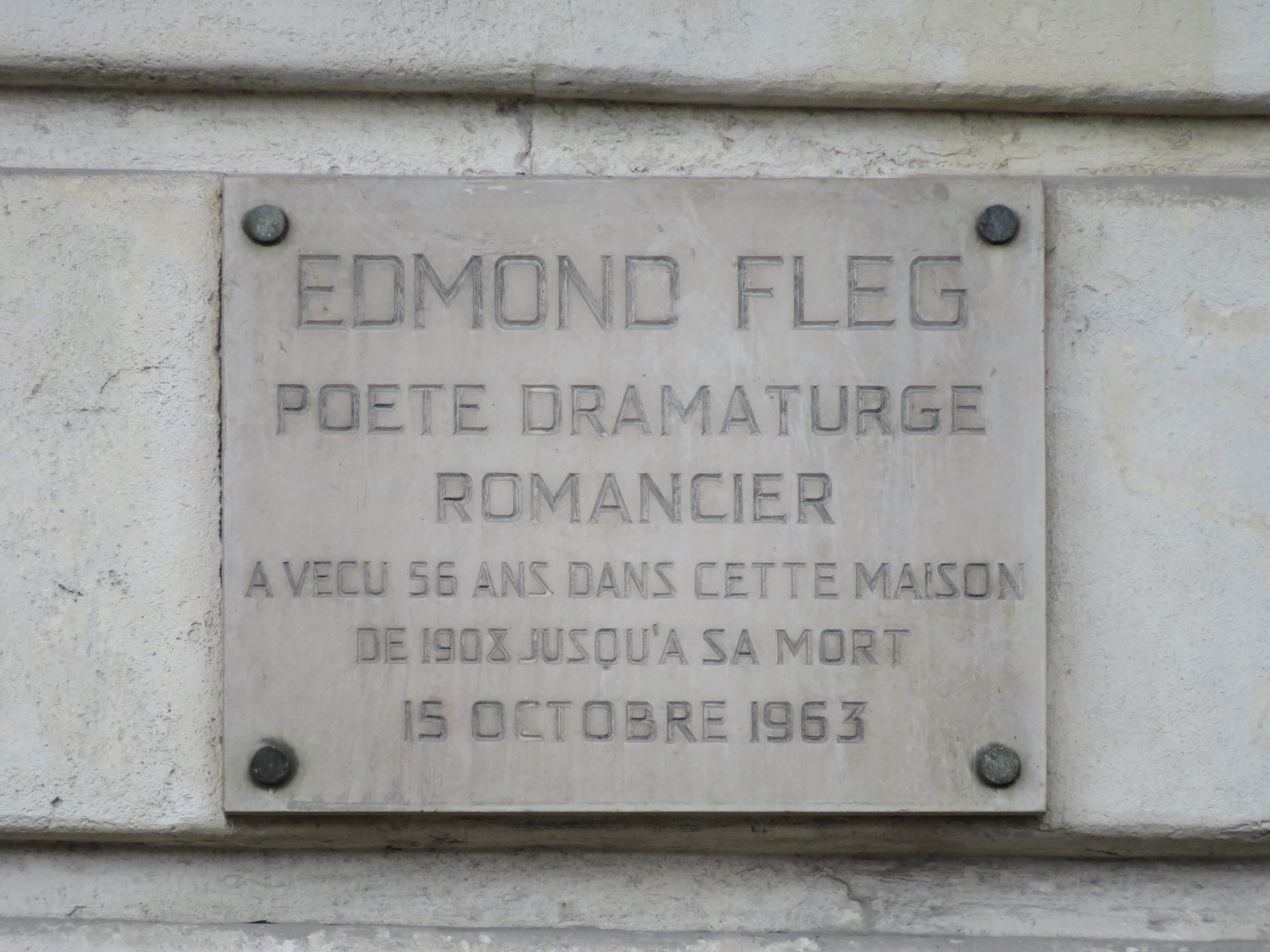 Plaque commémorative, 1a quai aux Fleurs, Paris « Poète dramaturge romancier A vécu 56 ans dans cette maison De 1908 jusqu’à sa mort 15 octobre 1963 »